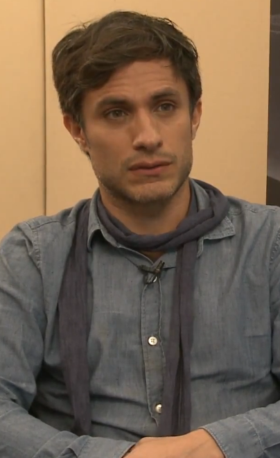 "Público de Cannes, el más difícil de todos los festivales": Gael García Bernal